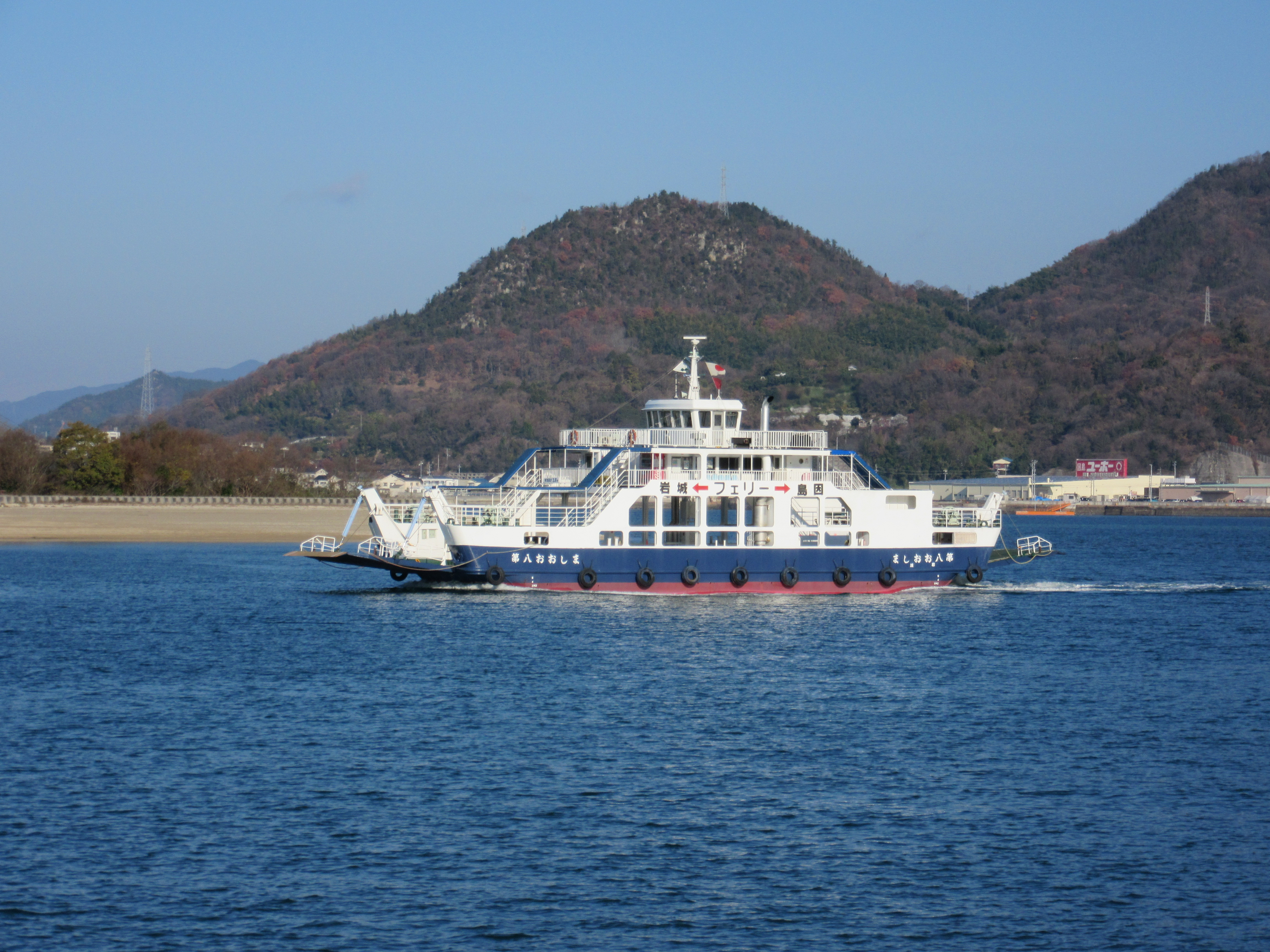 長江フェリー